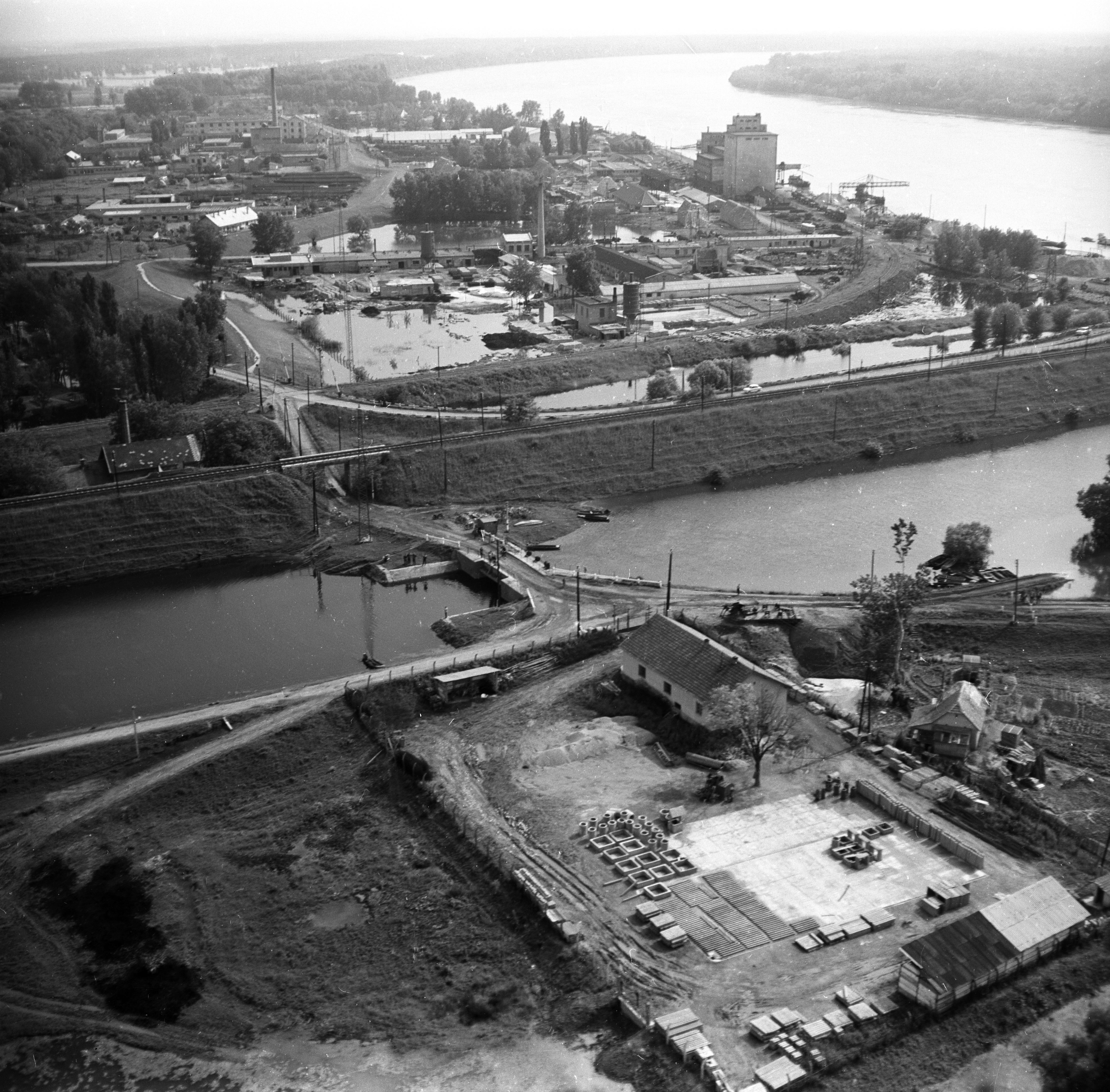 légifotó, a Duna-völgyi-főcsatorna torkolata a Dunánál. Location: Hungary, Baja Tags: aerial photo Title: légifotó, a Duna-völgyi-főcsatorna torkolata a Dunánál.